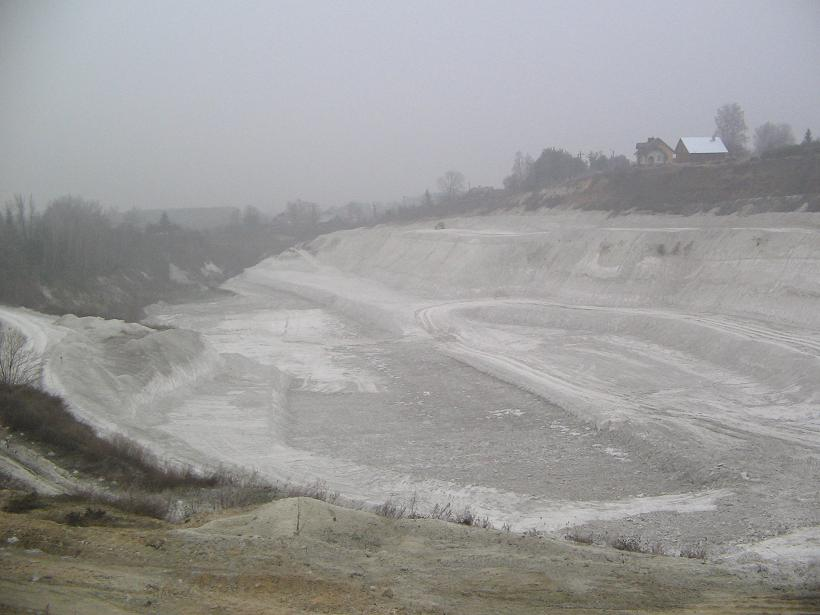 Mielnik (woj. podlaskie) kopalnia kredy